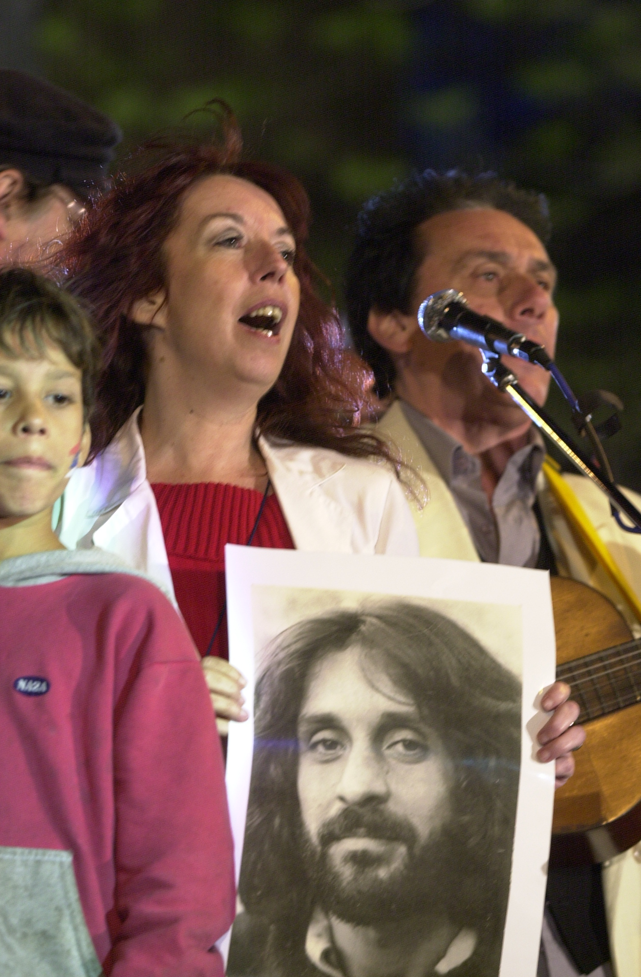 Homenaje al músico uruguayo Jorge Lazaroff. La en la fotografía se encuentran los músicos Adriana Ducret y Jorge Bonaldi.